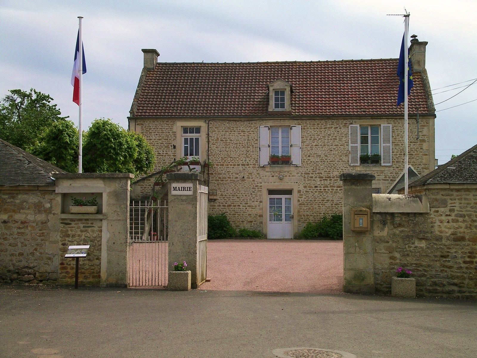 Mairie de Tournebu (Calvados)